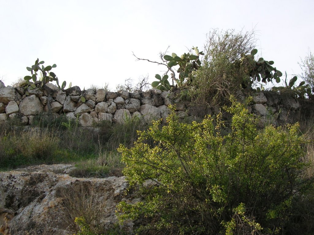 חורבת ברפיליה שרידי הגדר